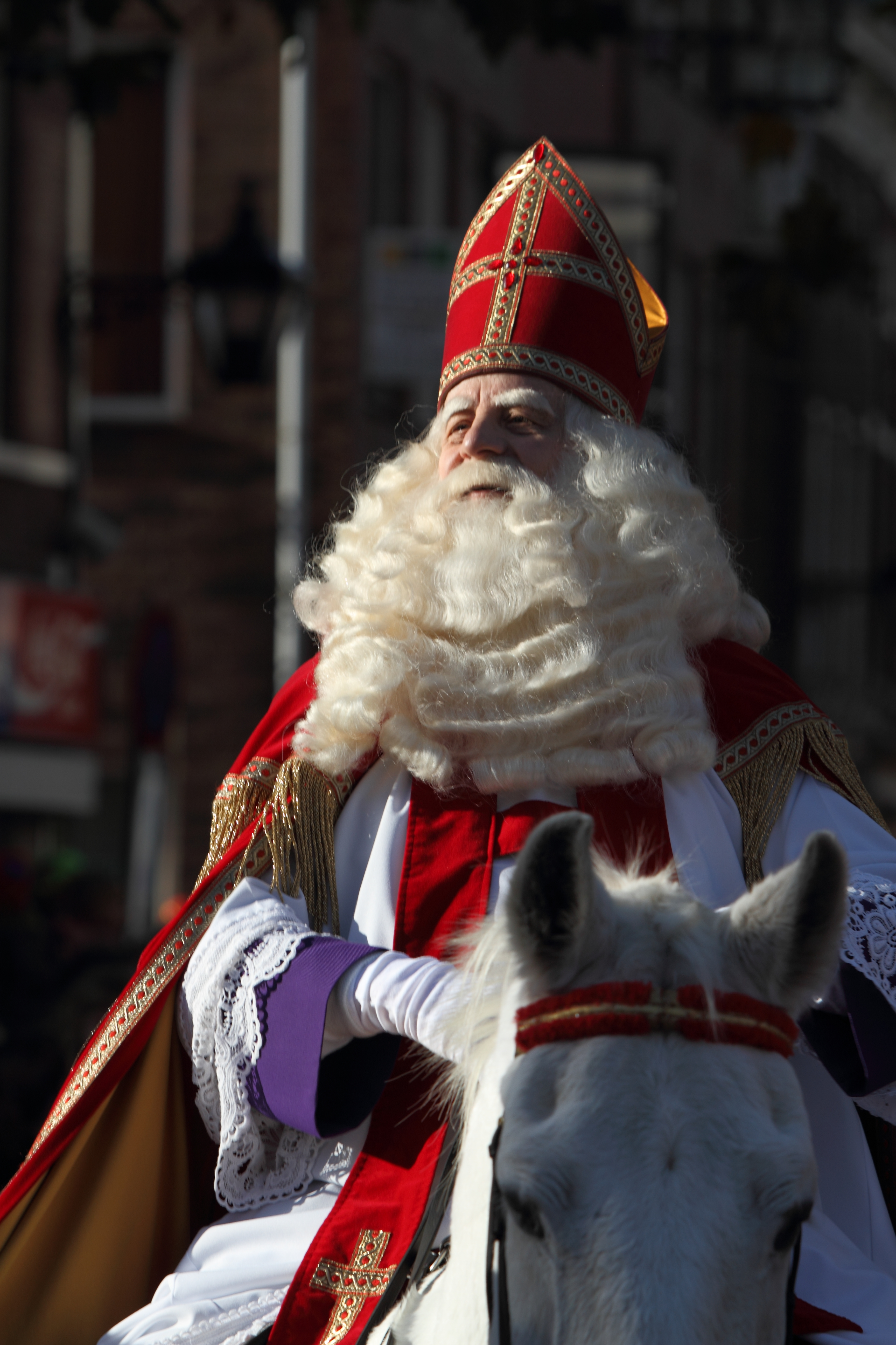 Intocht van Sinterklaas in Schiedam 2009